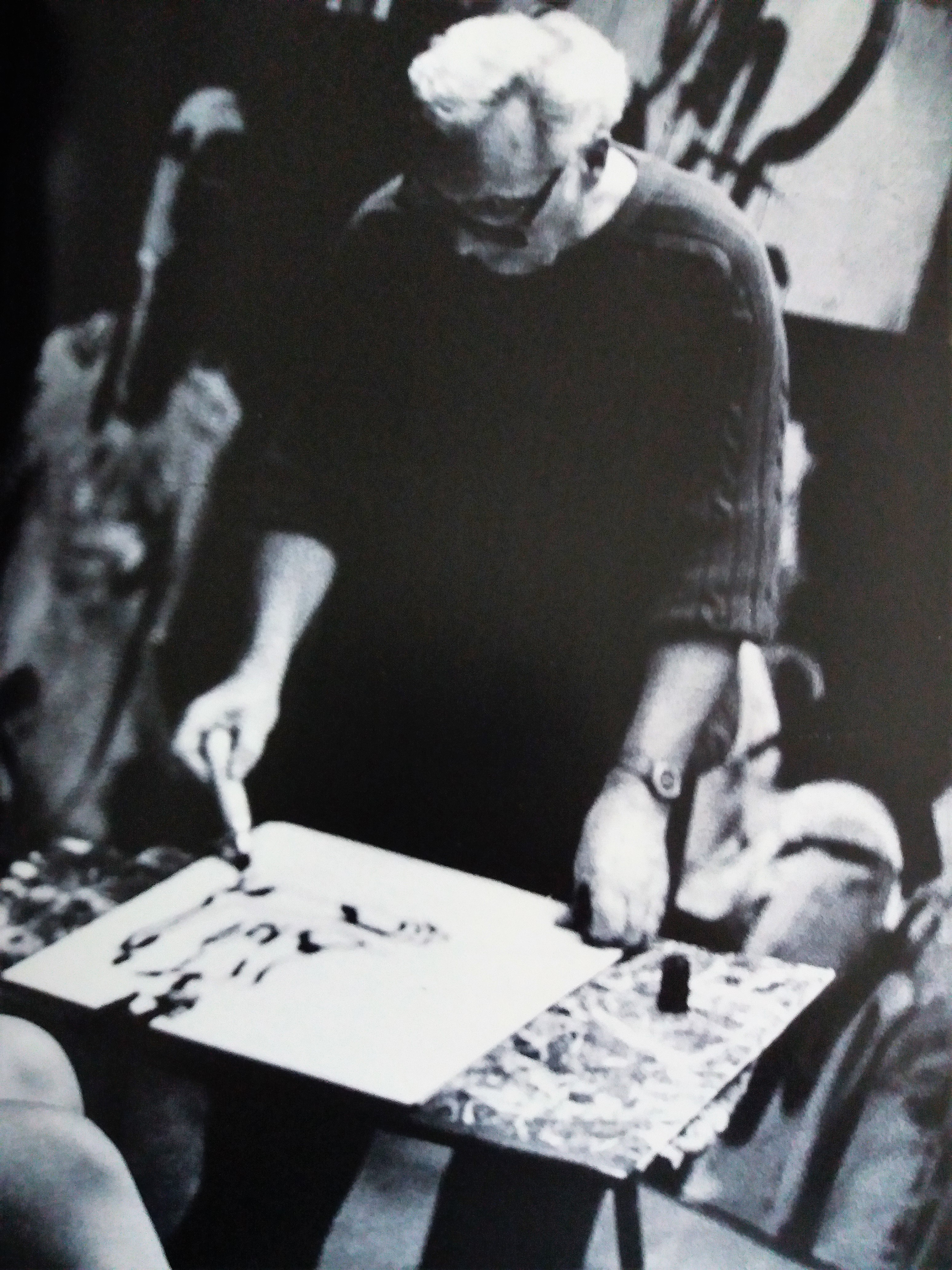 Serge Labégorre en plein travail